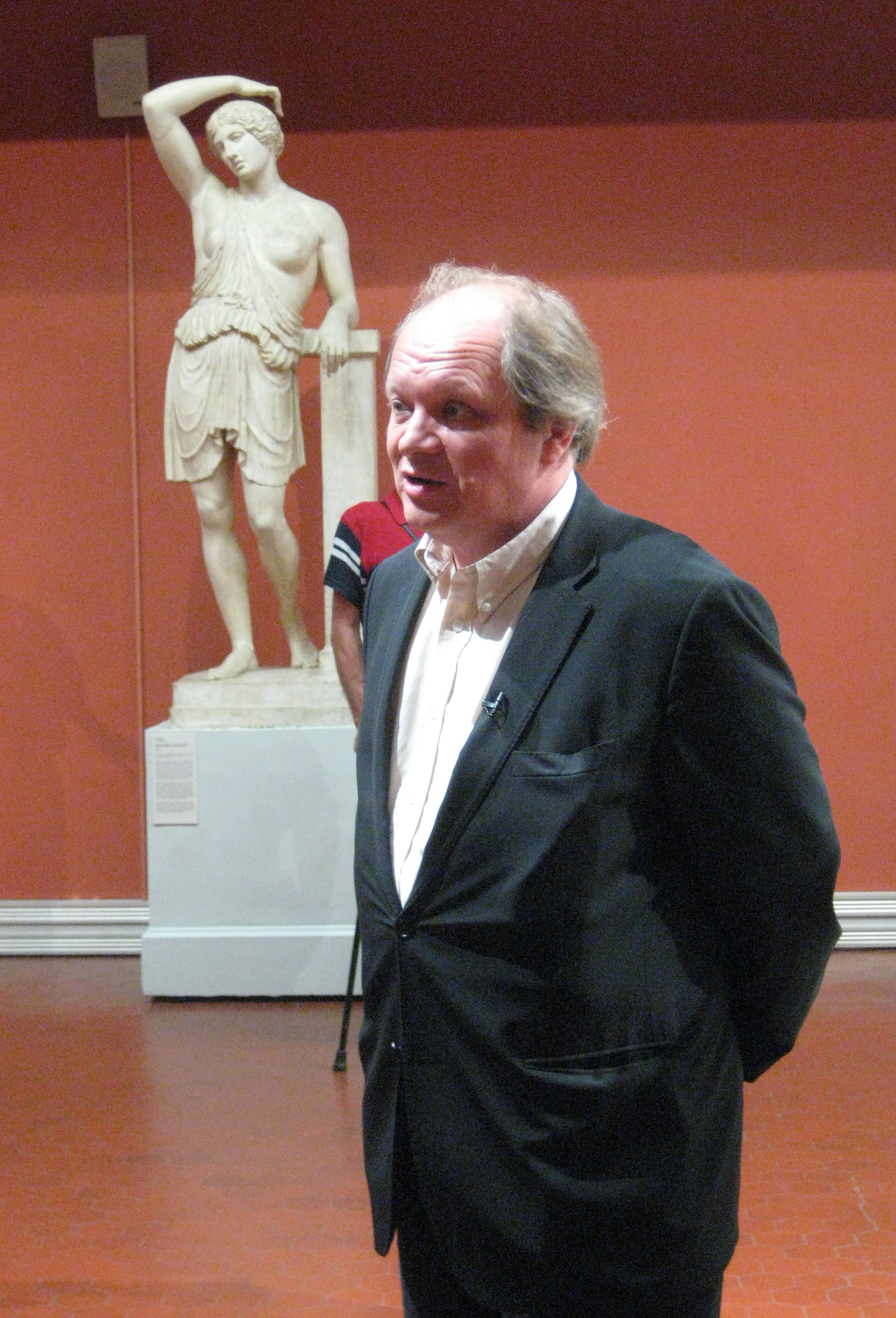 Толстой, Андрей Владимирович